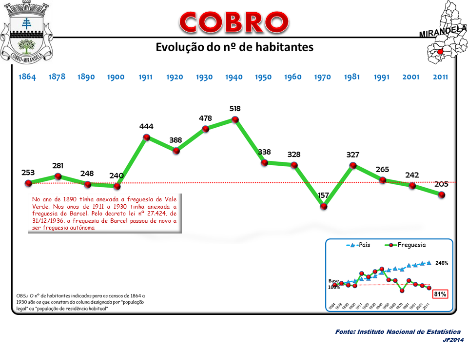 Evolução da População 1864 / 2011